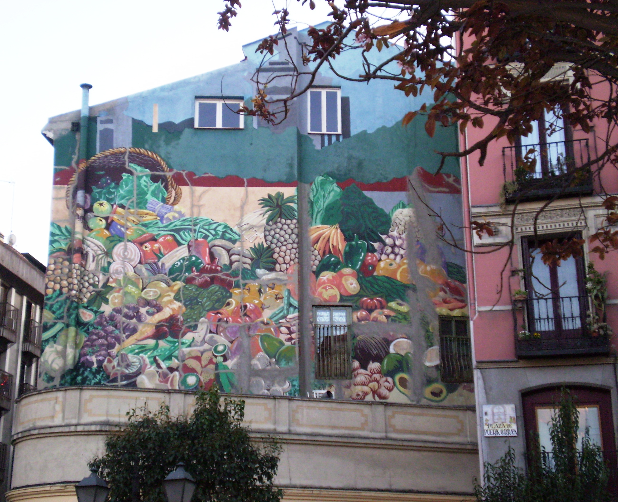 Puerta Cerrada Square. Madrid, Spain.